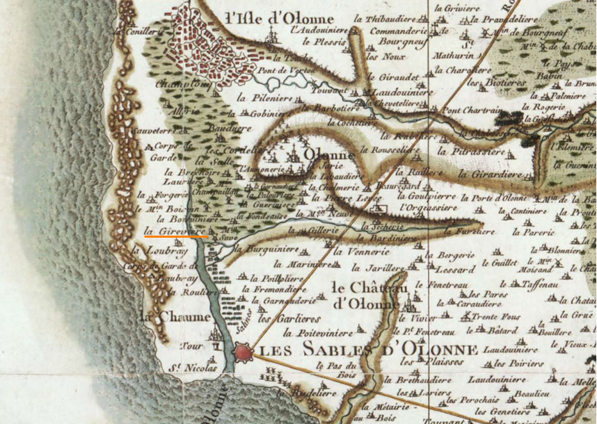 Extrait de la carte Cassini de la Vendée centrée sur le Pays des Olonnes. Le nom de La Gireviere est souligné, en tant que quartier d'Olonne sur Mer.